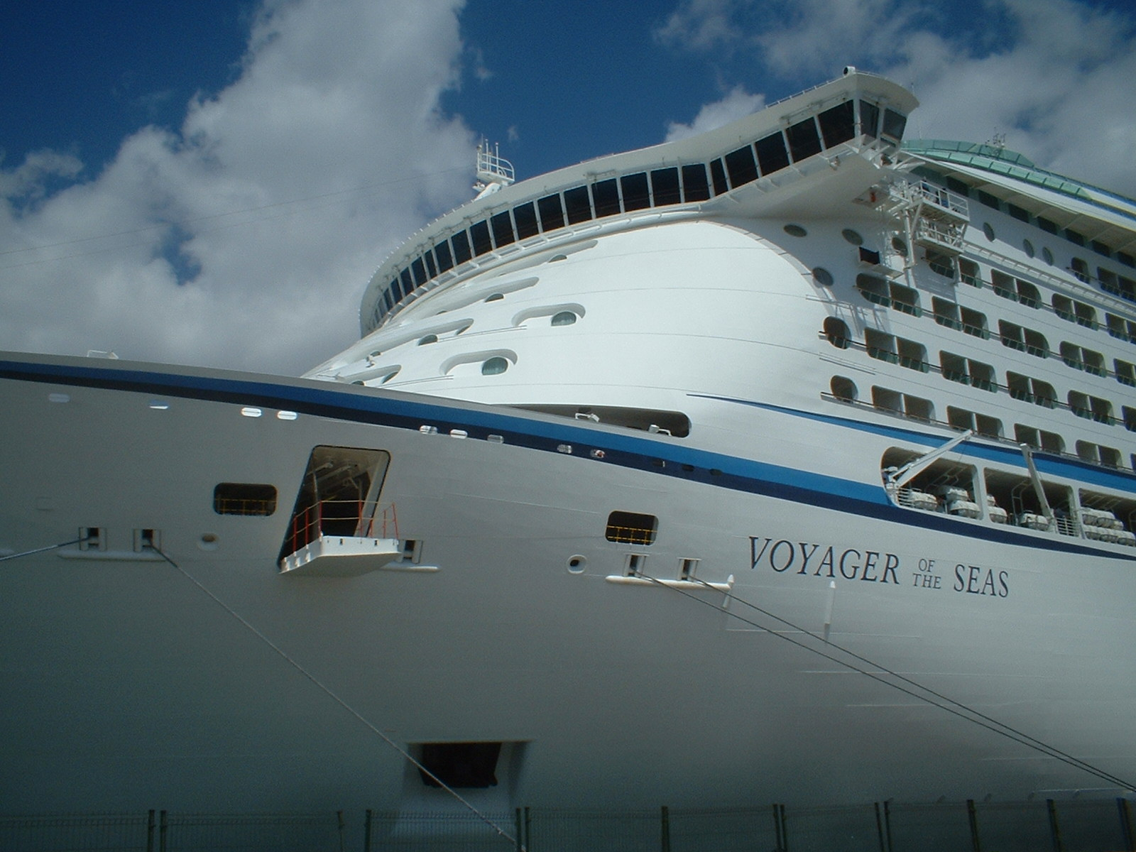 Die Voyager of the Seas während eines Halts in Palma De Mallorca